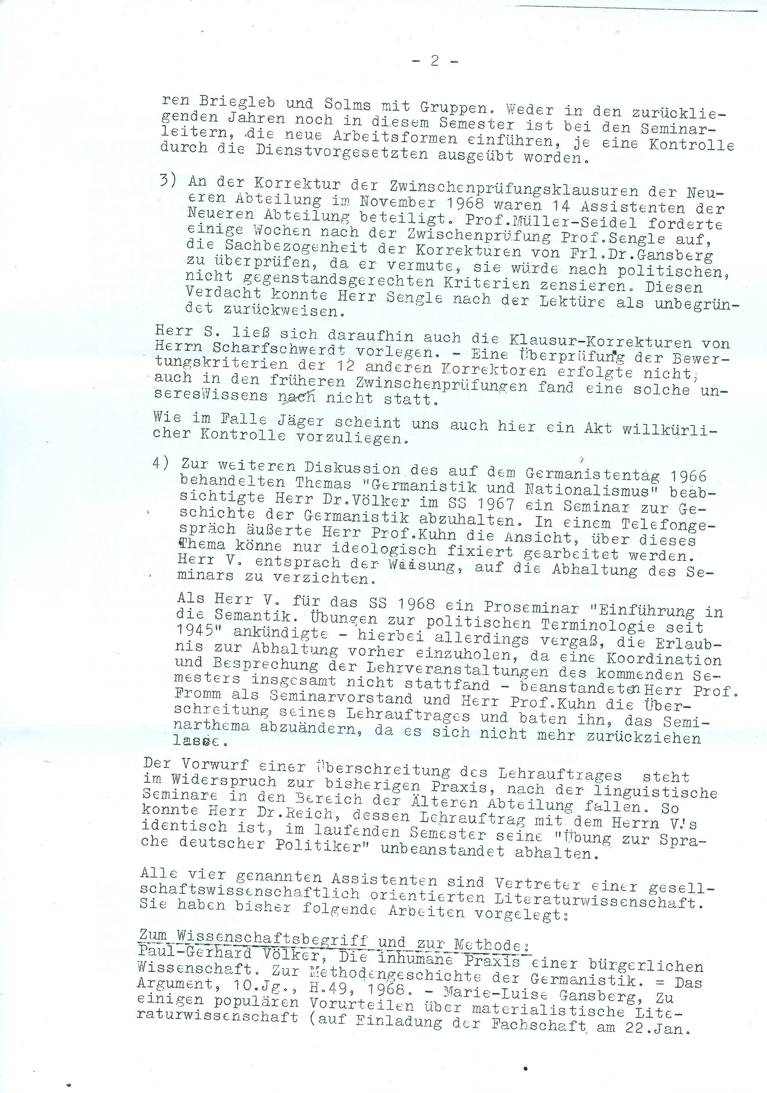 Assistenten-Flugblatt, Wintersemester 1968-69. Universität München, Deutsches Seminar [= Seminare für Deutsche Philologie I und II].